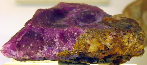 Sphaerocobaltite from Peramea (Lérida)